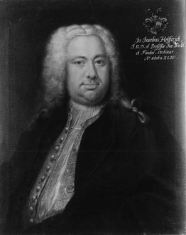 Prof. Johann Jakob Helfferich, Gemälde in der Tübinger Professorengalerie